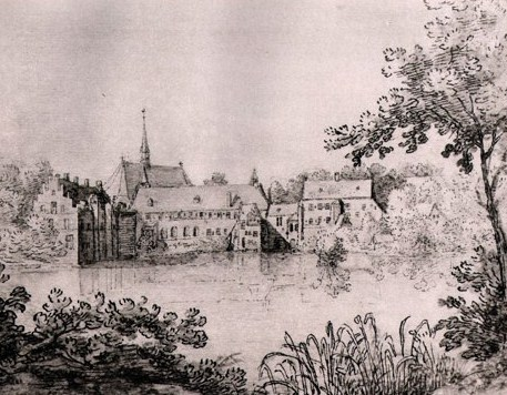 Jan Brueghel l'Ancien Héliogravure originale sur papier velin de Hollande Van Gelder Zonen. Anonyme. 1910